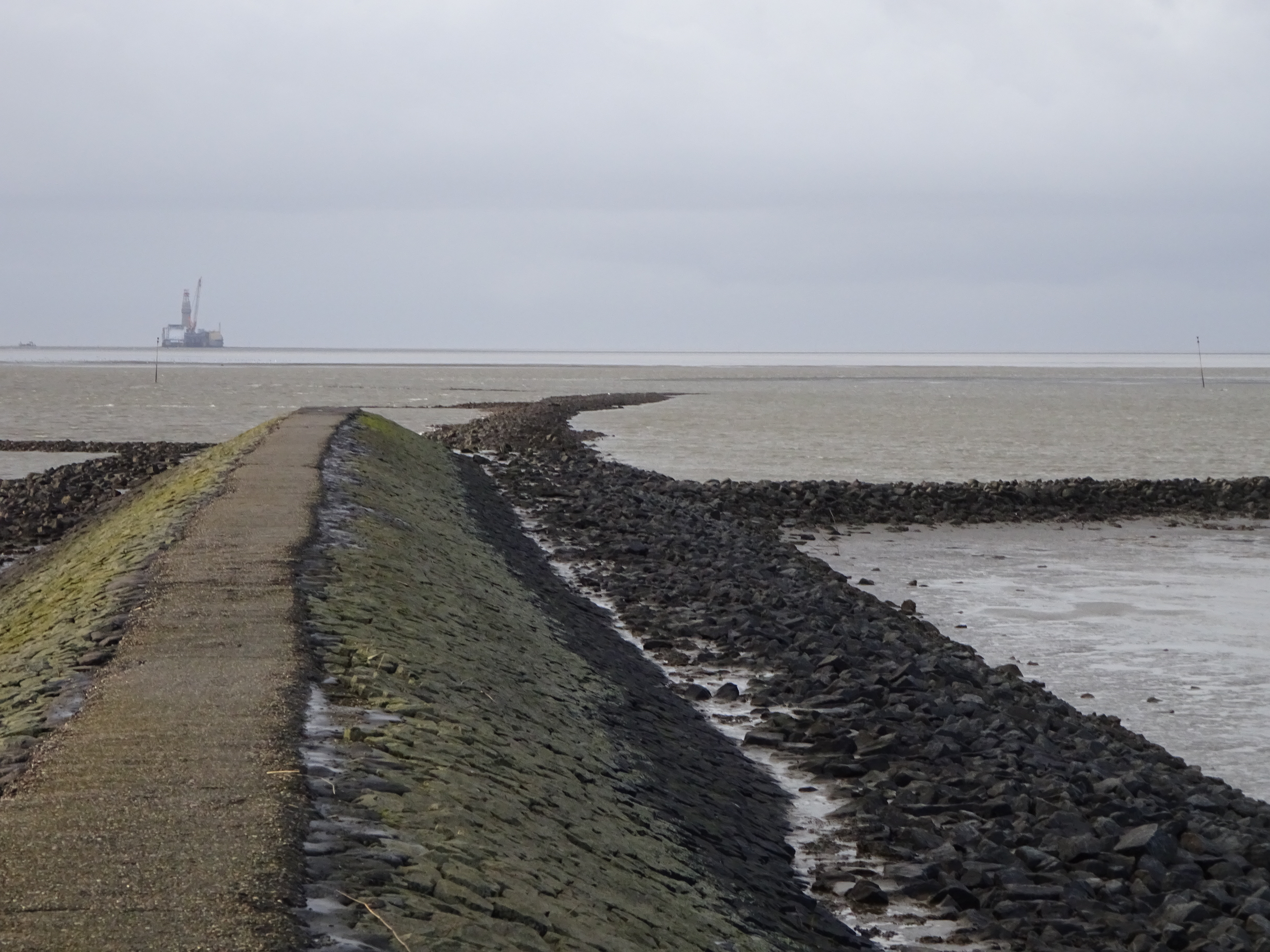 Endstück des Trischendamms und weiterführende Buhne als ursprüngliche Vorbereitung zum weiteren Bau bei Niedrigwasser. Im Hintergrund die Ölförderplattform Mittelplate.